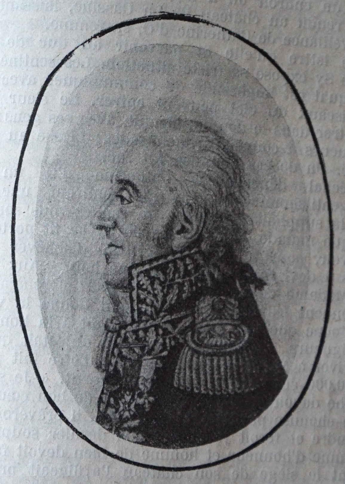 almanach Matot-Braine de 1914.